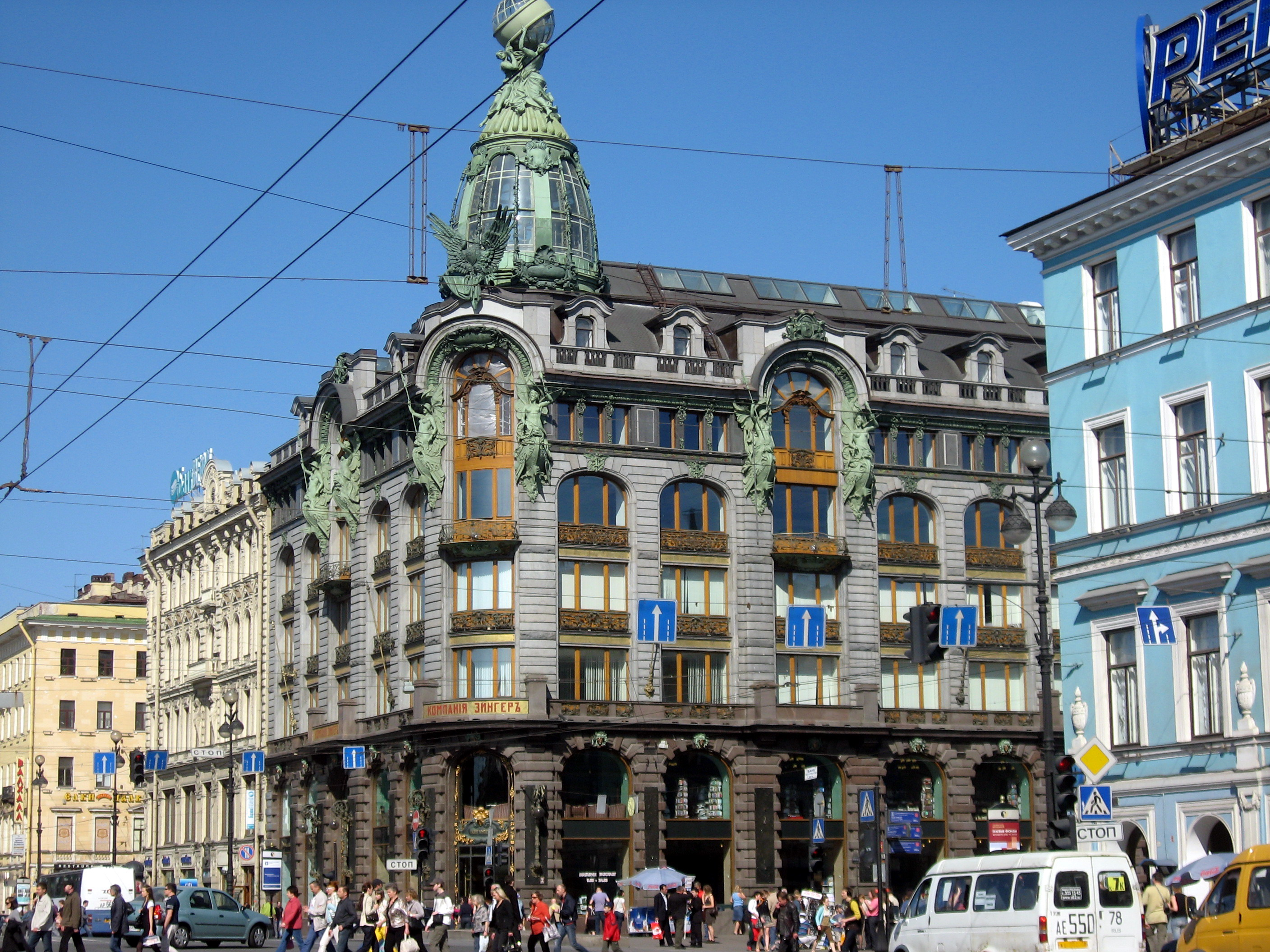 Sankt-Petěrburg (Petrohrad), Něvský prospekt